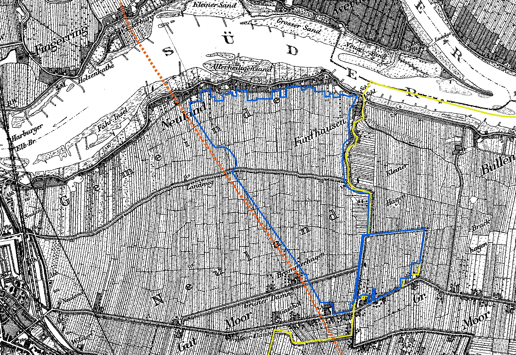 Naturschutzgebiet Neuländer Moorwiesen (blaue Linie), Landesgrenze Hamburg (gelbe Linie), Autobahn A1 (rote Punktlinie). Karte: Preußische Landesaufnahme 1880